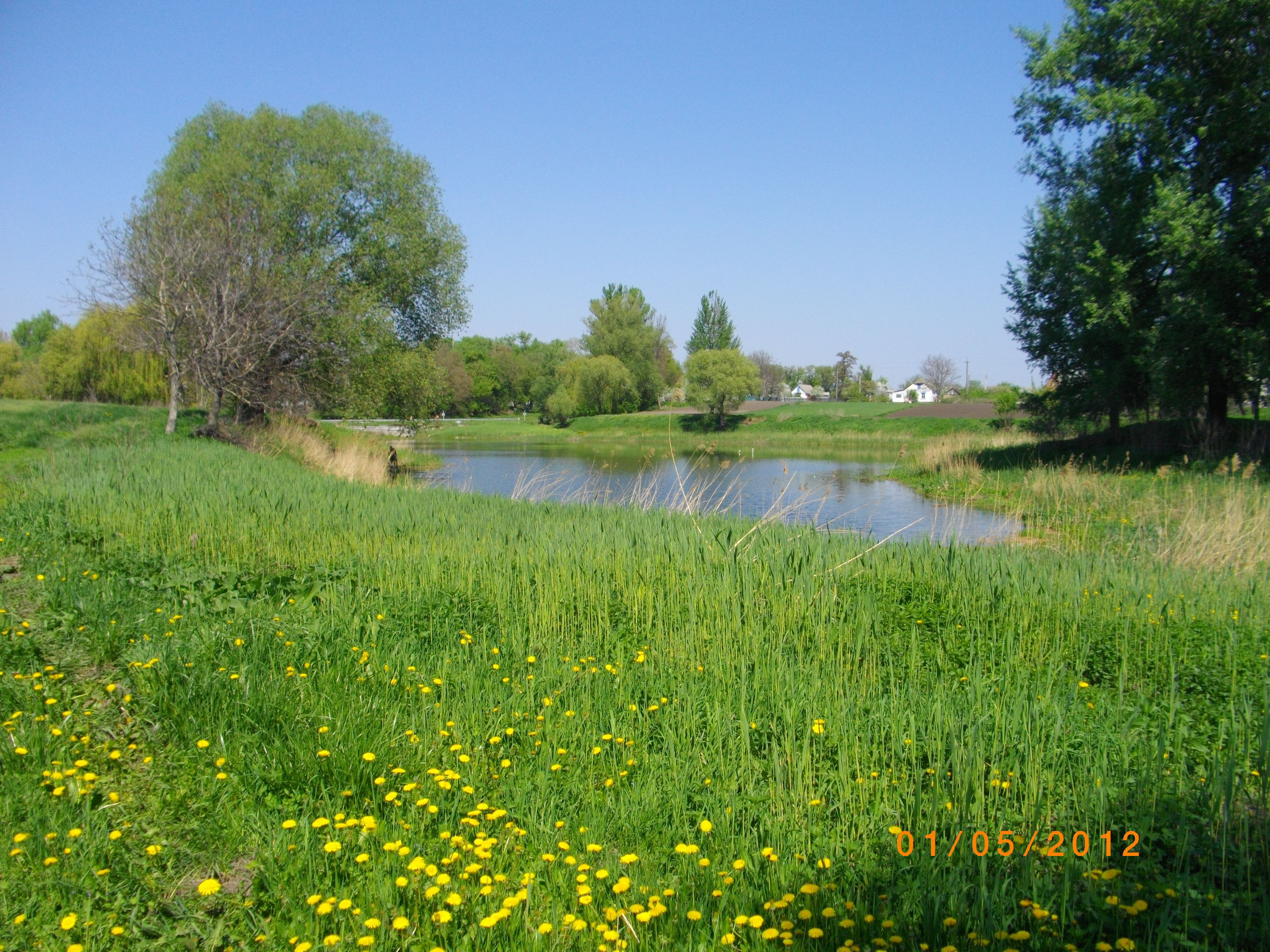 Пруд 2